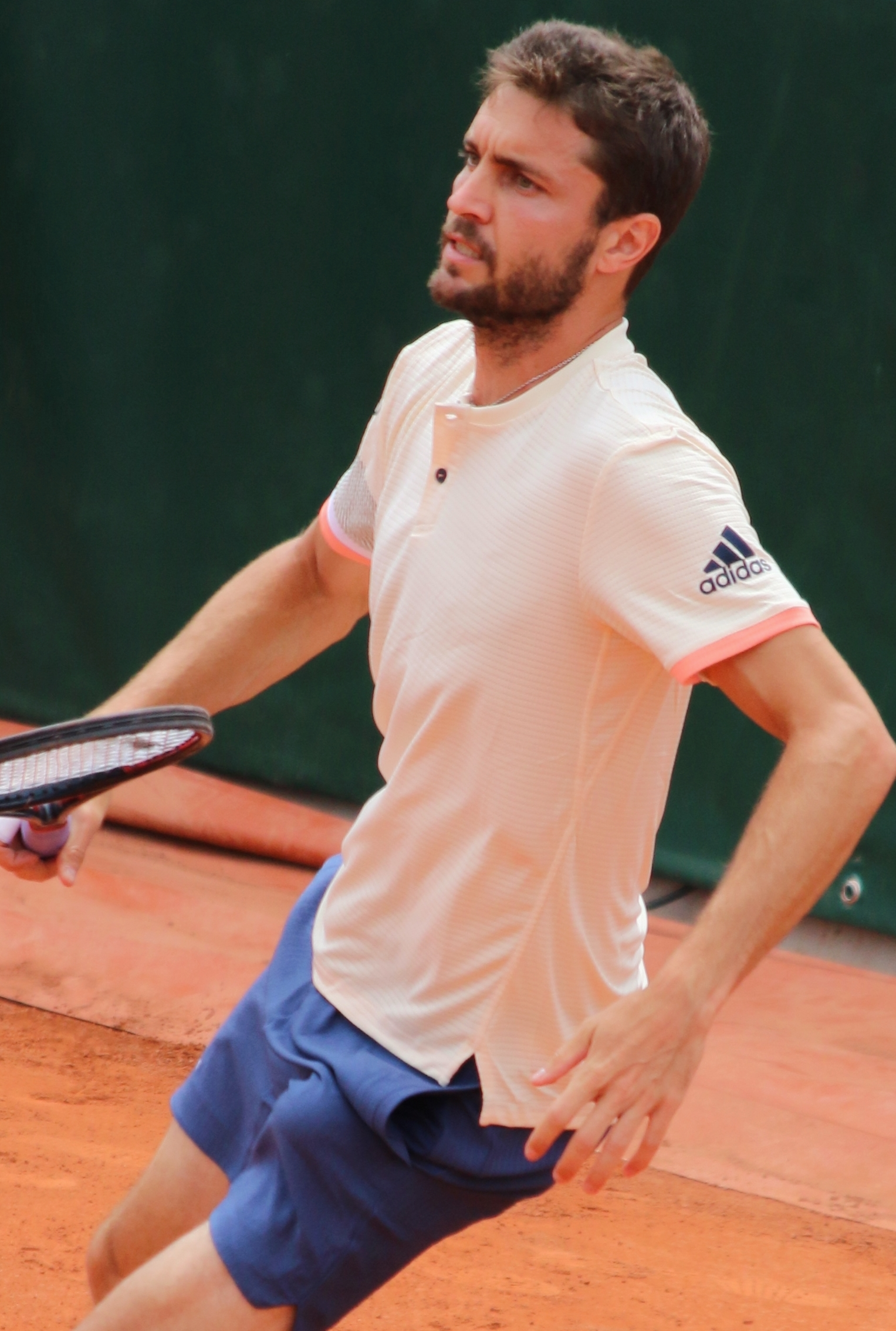 Simon RG18 (30)